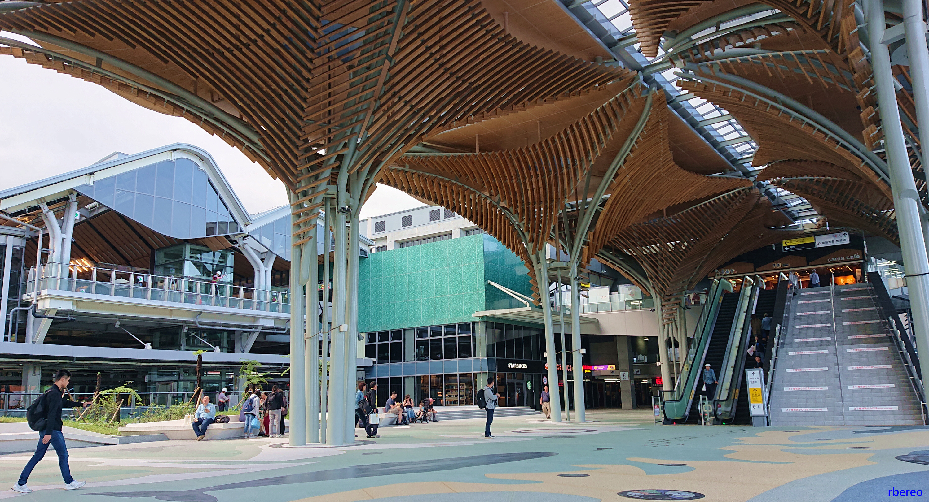 108年10月花蓮車站東站廣場